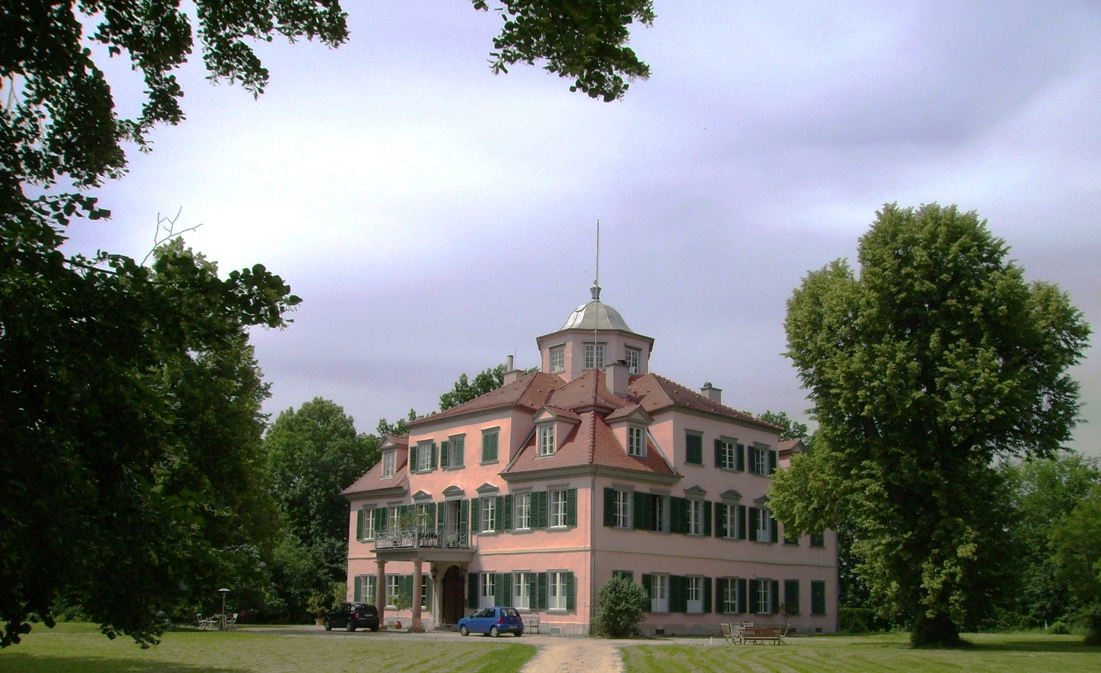 Hechingen, Germany